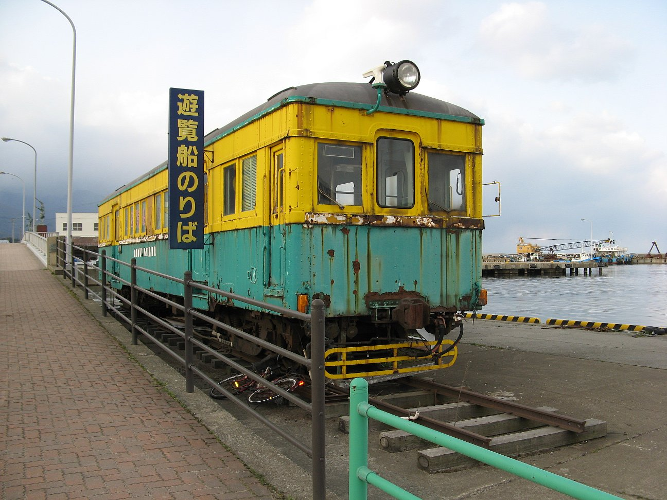 佐渡島両津港の新潟交通クハ45形電車。車体の傷みが顕著で解説表示も無く、ウインドシルが脱落したままになっているなど保存状態は悪い。静態保存というより「放置」と言える。